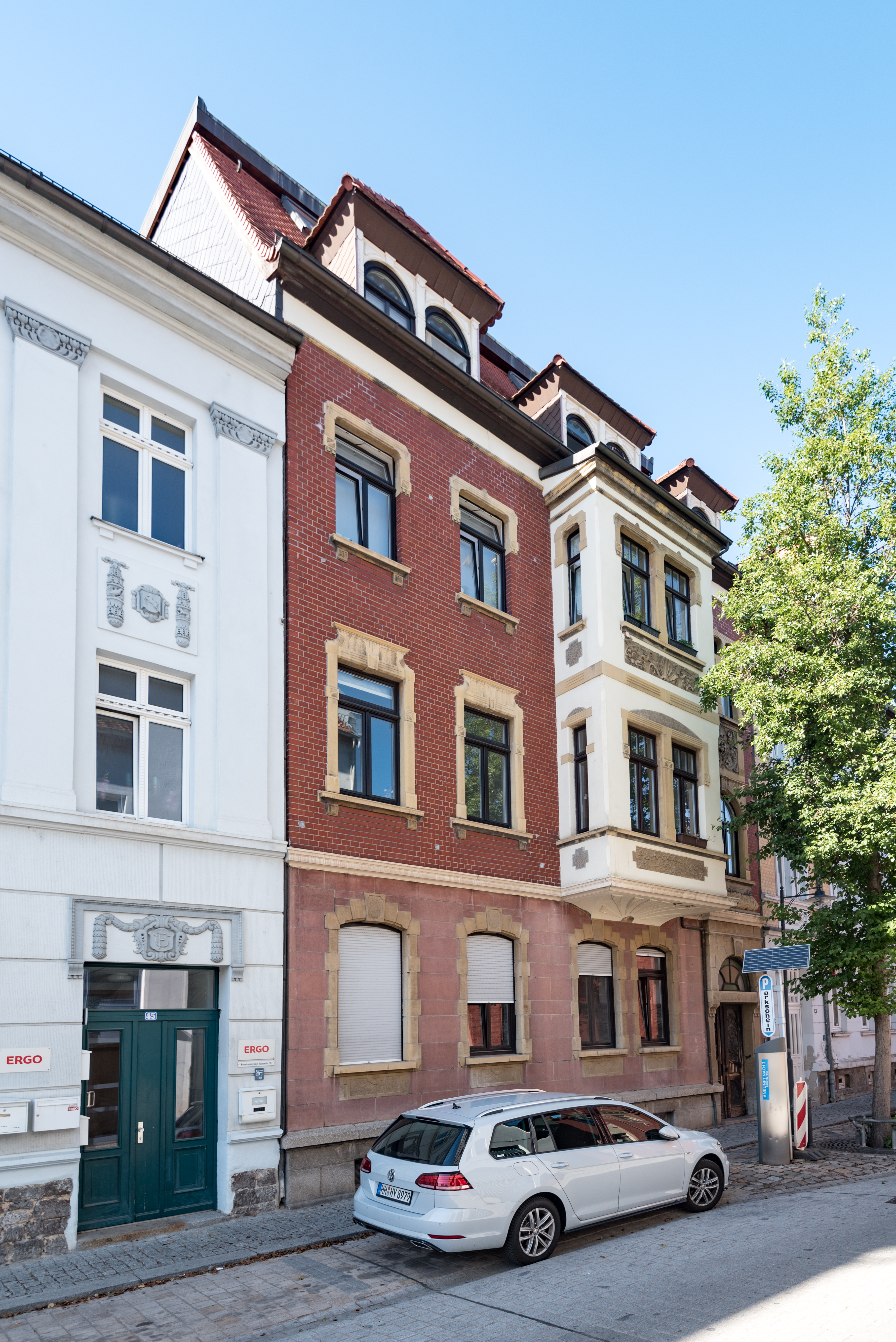 Weißenfels, Große Kalandstraße 43